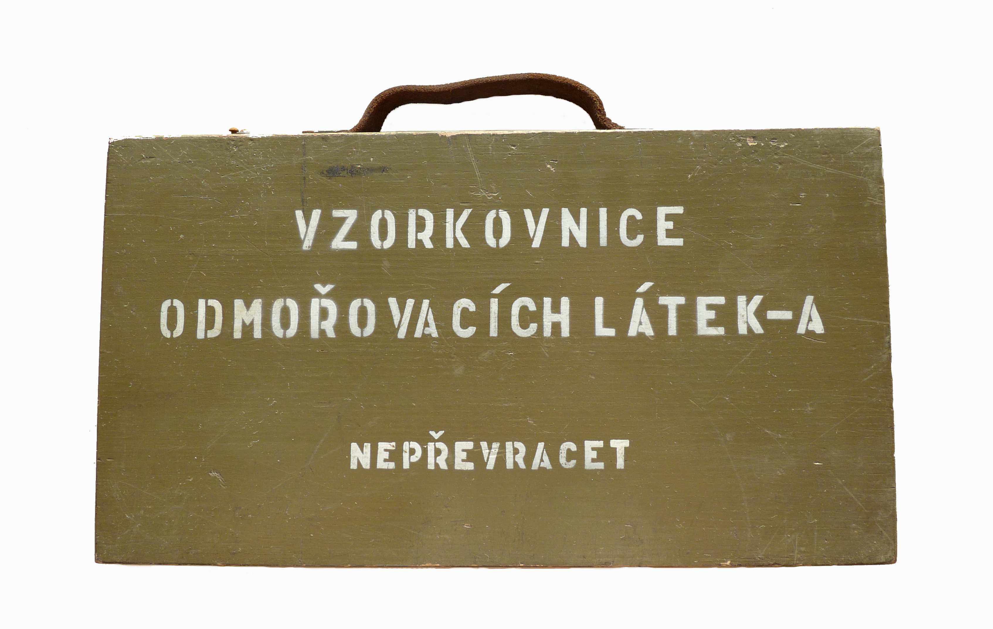 Vzorkovnice odmořivacích látek-A